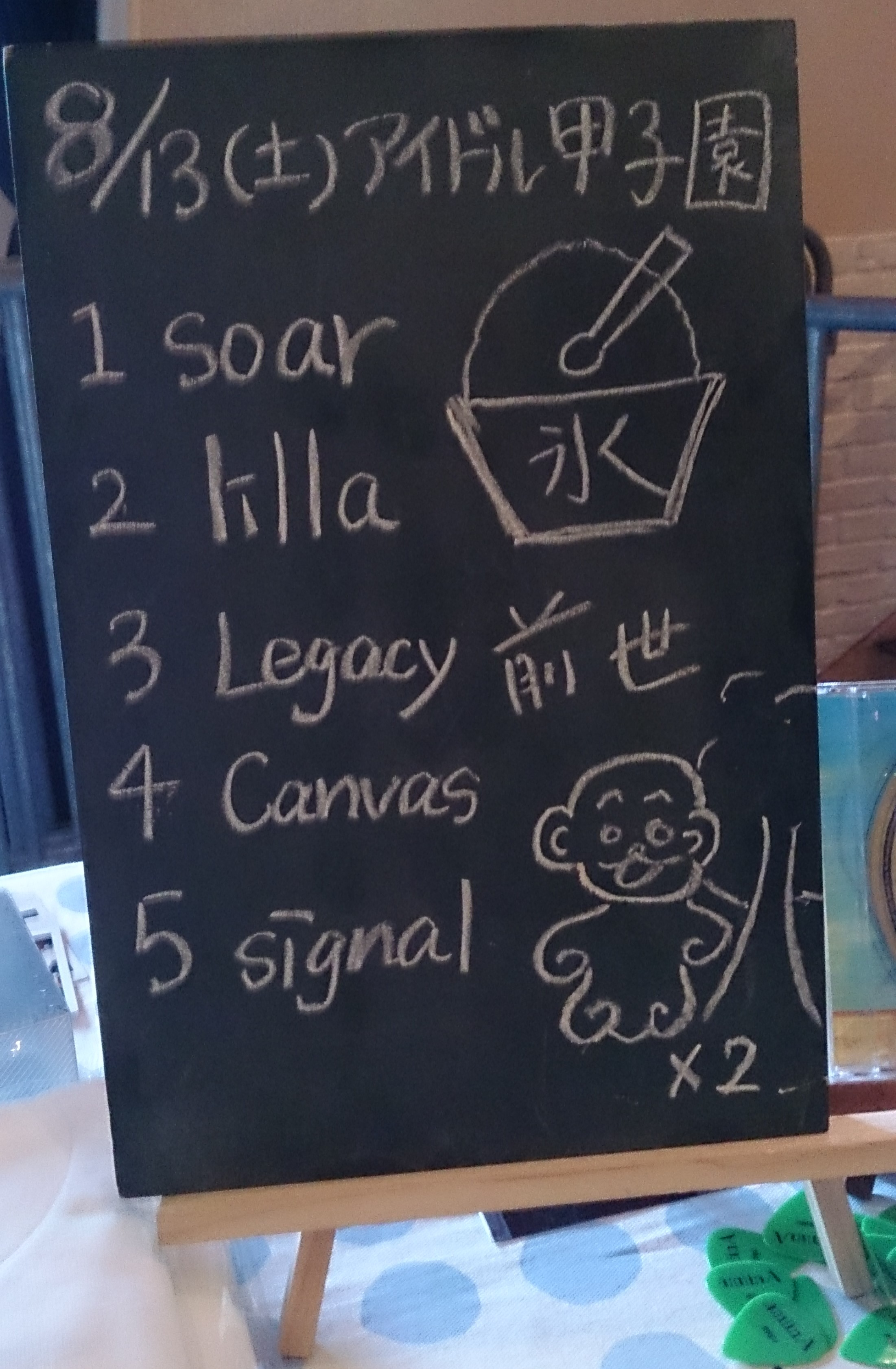 amiinAセトリボード(20160813(1))